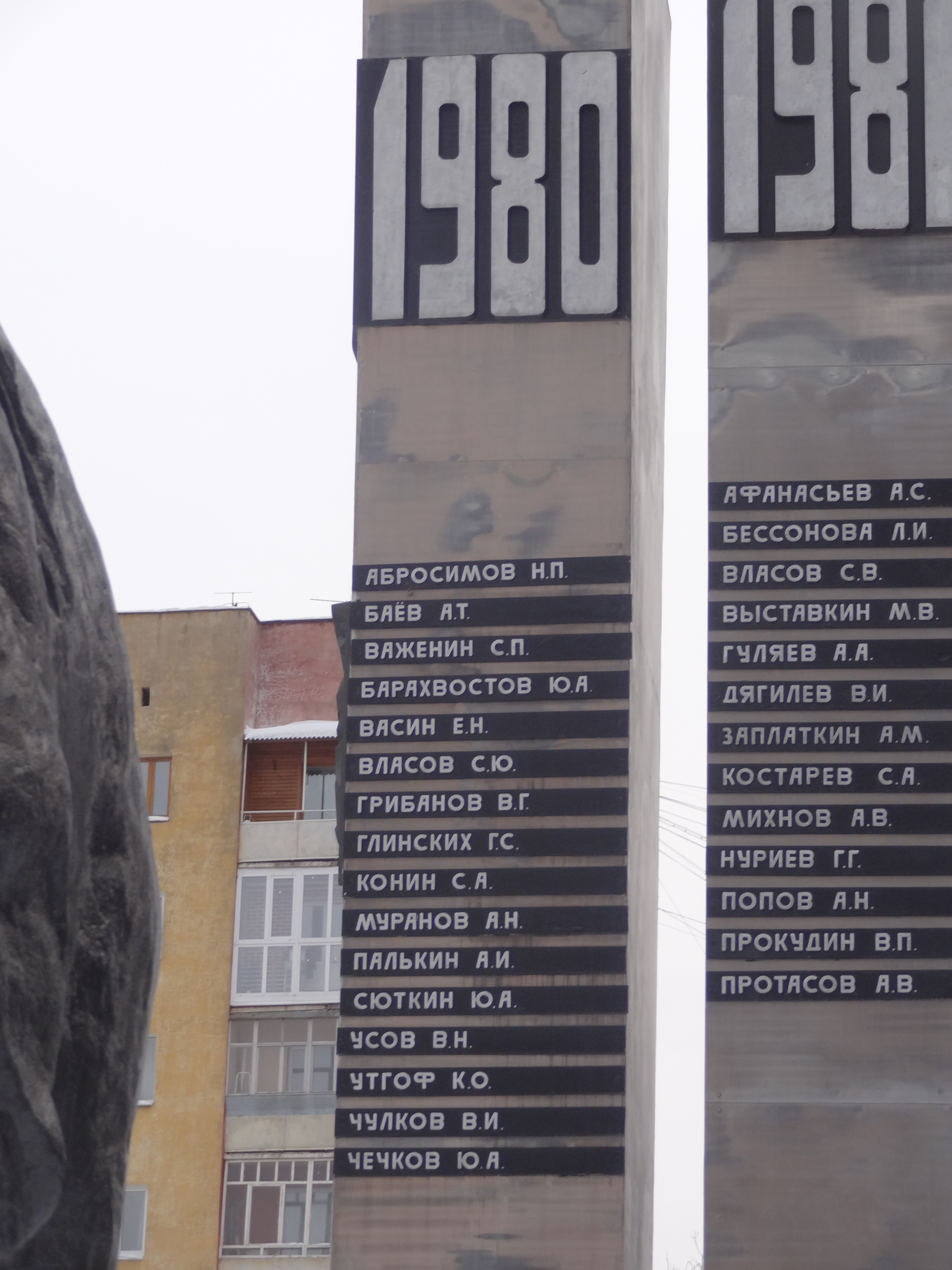 Комплекс памяти "Чёрный тюльпан". Художественная идея памятника — стилизованное пространство грузового военно-транспортного самолёта, перевозившего на Родину тела погибших солдат и офицеров. Такие самолёты сами «афганцы» называли «Чёрными тюльпанами». В центре композиции — фигура сидящего солдата с автоматом, вокруг установлены имитирующие каркас фюзеляжа самолёта металлические пилоны с именами уральцев, погибших во время боевых действий в Афганистане. Памятник изготовлен из металла со специальным покрытием. Вес центральной фигуры памятника — 4,5 тонны, высота — 4,7 метра. Высота пилонов — 10 метров. На десяти пилонах памятника 240 фамилий свердловчан, погибших в Афганистане. В 2002 году этот ансамбль был дополнен гранитными стелами с фамилиями военнослужащих, погибших в Чеченской Республике и Дагестане.